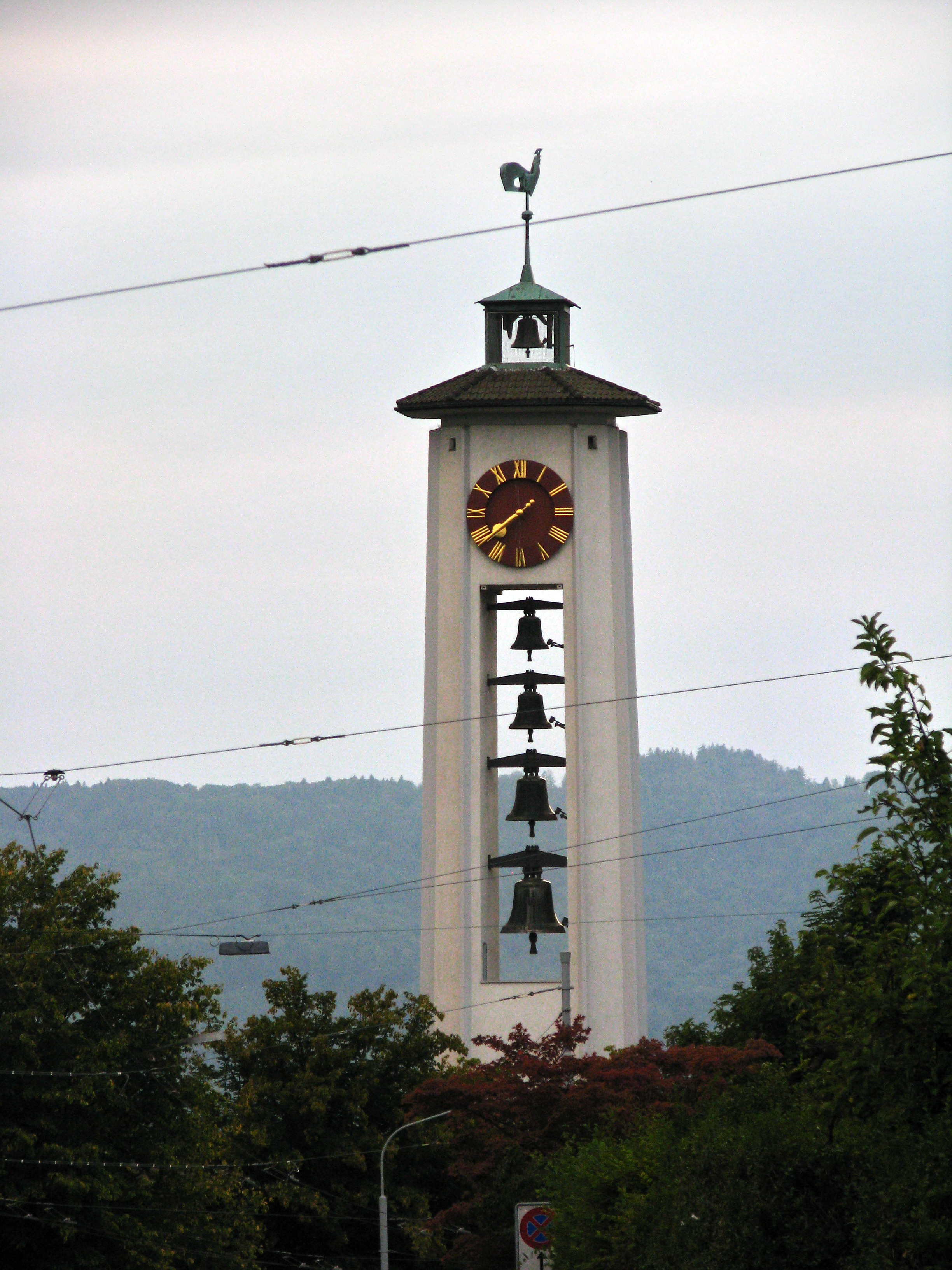 Zürich-Witikon, Uetliberg in the background.